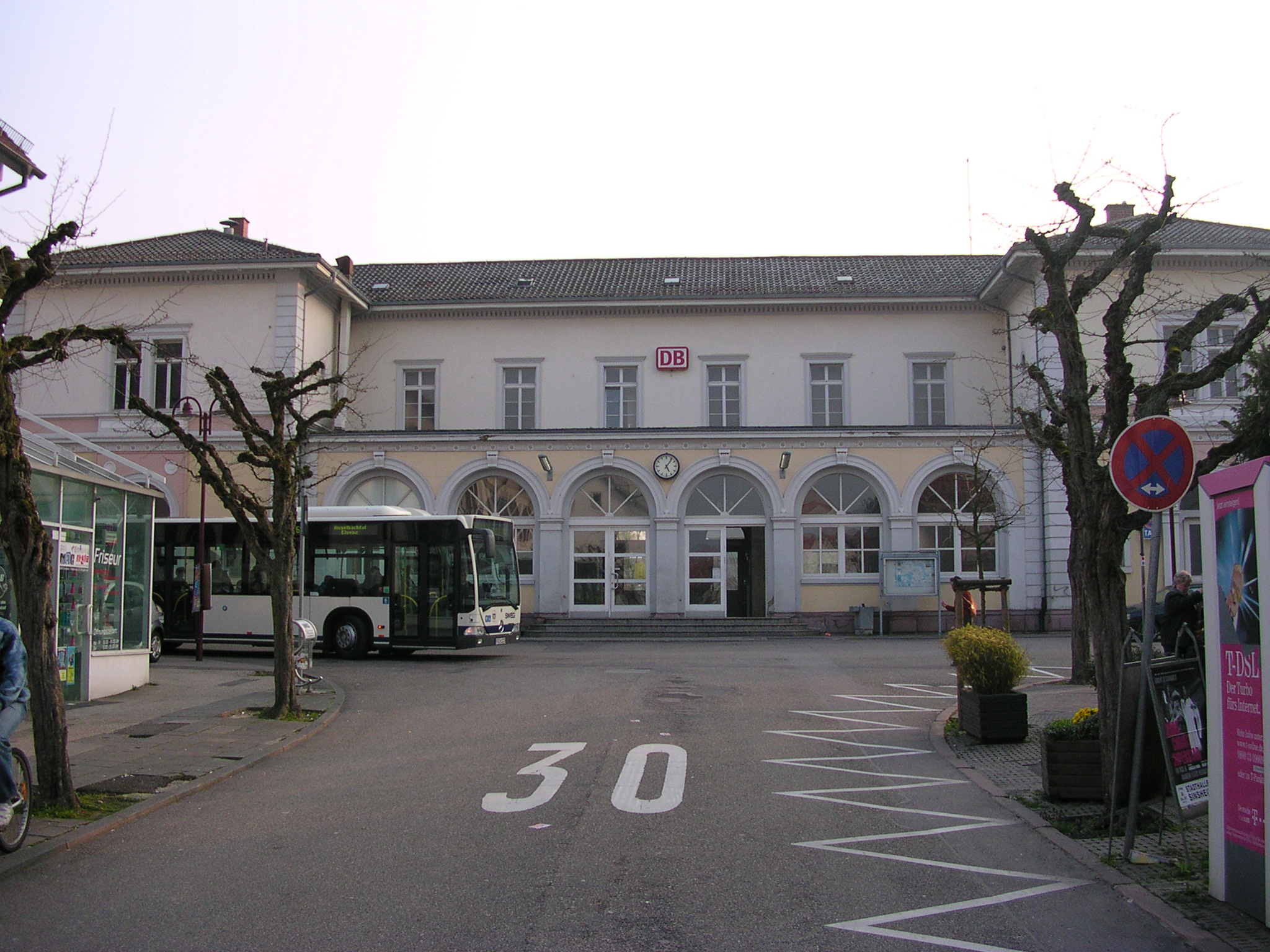 Das Bahnhofsgebäude im Weinbrenner-Stil von einem Schüler des berühmten Architekten entworfen, wurde 1867/68 erbaut. Der badische Großherzog Friedrich I. hatte großen Wert darauf gelegt, dass alle Bahnhöfe und Amtsgebäude Badens in diesem einheitlichen Baustil mit klassizistischen Elementen errichtet wurden. Der Bahnreisende sollte bei Ankunft gleich erkennen: Ich bin jetzt im Großherzogtum Baden. Auch wurde in allen Wartehallen der Bahnhöfe einzig das badische Rothaus-Bier ausgeschenkt. Die Bahnstrecke wurde erstmalig am 19. Juni 1868 (Meckesheim-Rappenau) befahren.